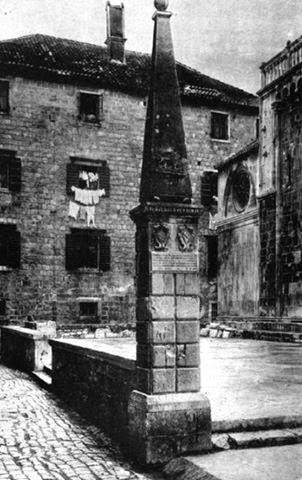 Bokanićev obelisk u Trogiru iz 1927 godine